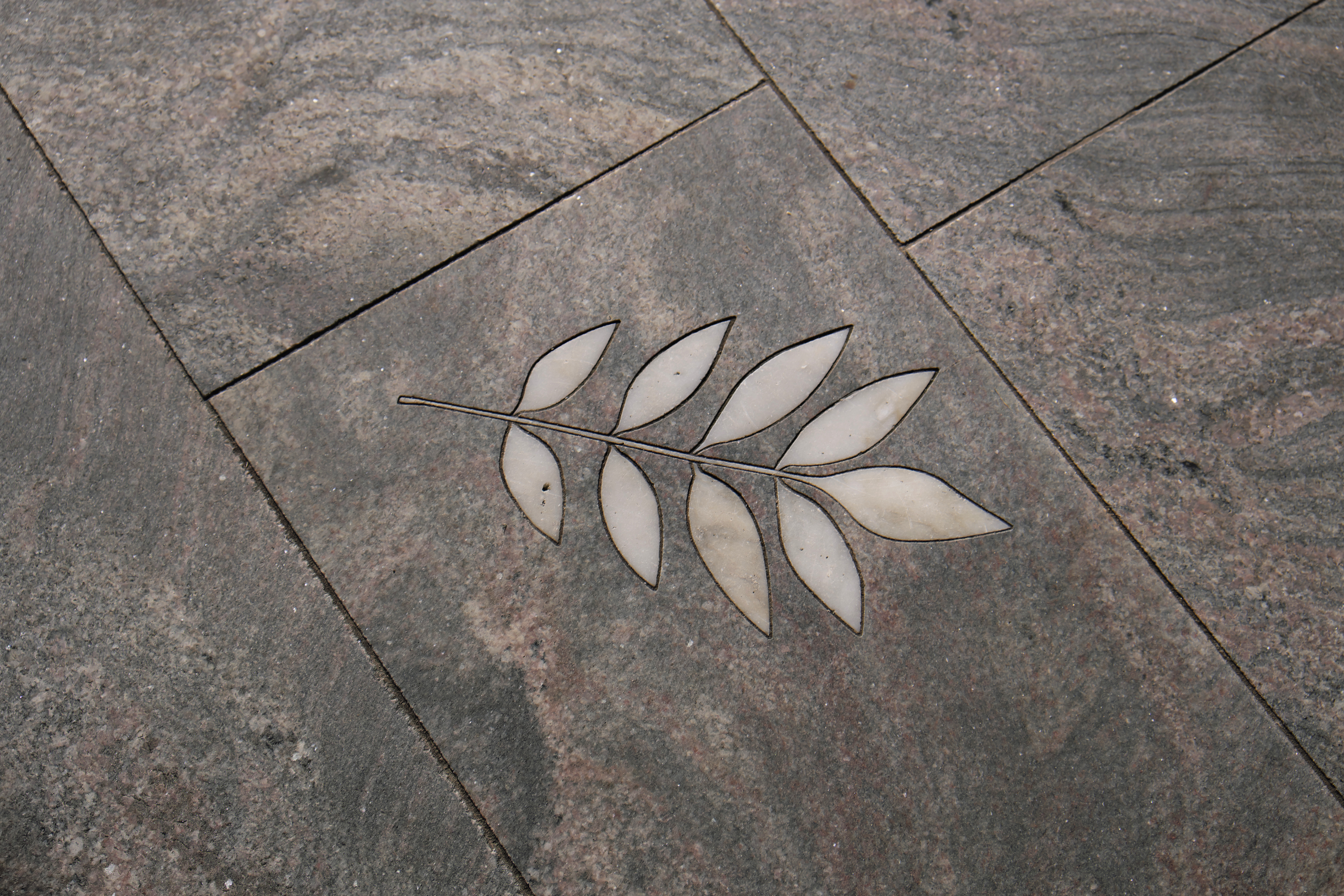 Pax-Gebäude: Eschenblatt am Boden vor dem Haupteingang